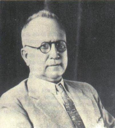 José Inocente Lugo Gómez., abogado mexicano, gobernador de los estados mexicanos de Guerrero (1911-1913) (1935-1937) y Baja California (1922-1923).